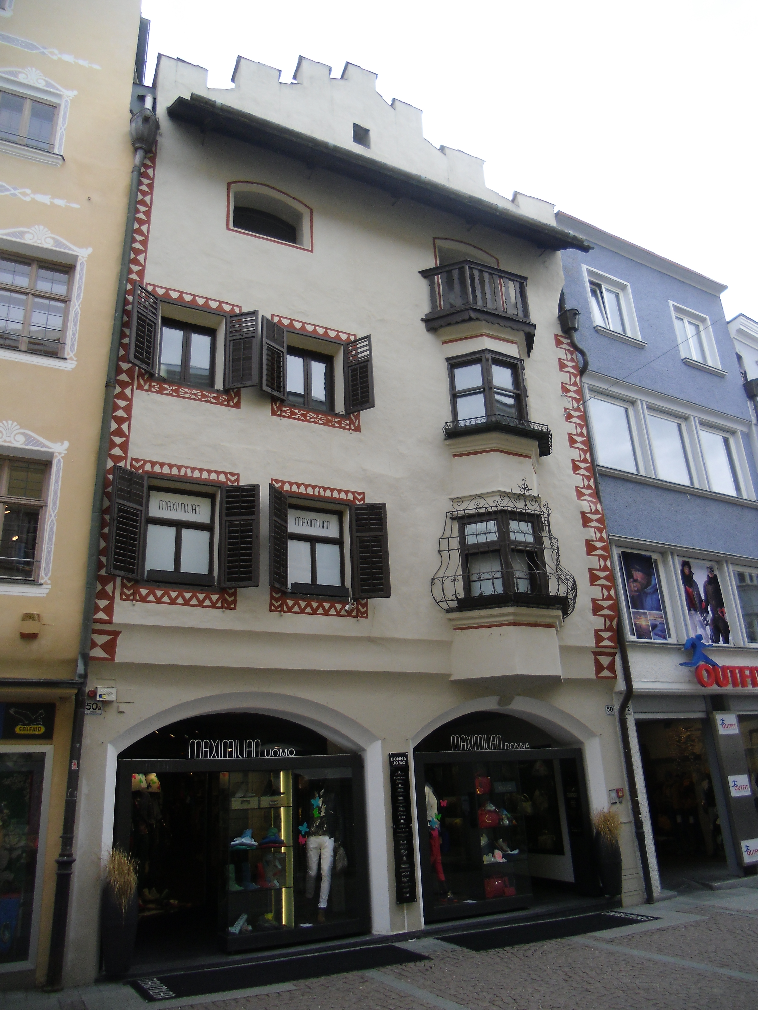 Stoffelehaus, Stadtgasse 50 in Bruneck (Südtirol)